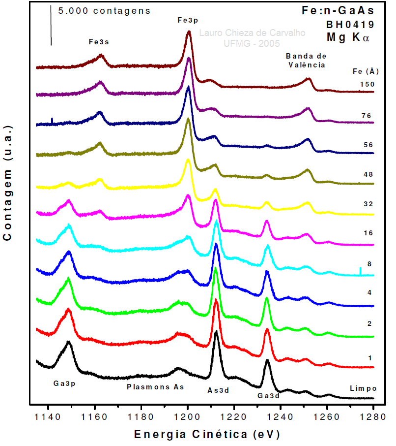 XPS: Sequência de espectros para deposição gradual de Fe sobre superfície GaAs(100) XPS: Sequence of spectra for gradual deposition of Fe on GaAs surface (100).